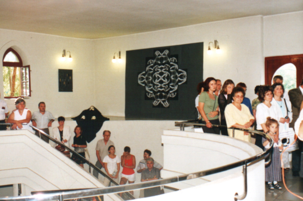 Hamza Studio-Fény, Jászberény